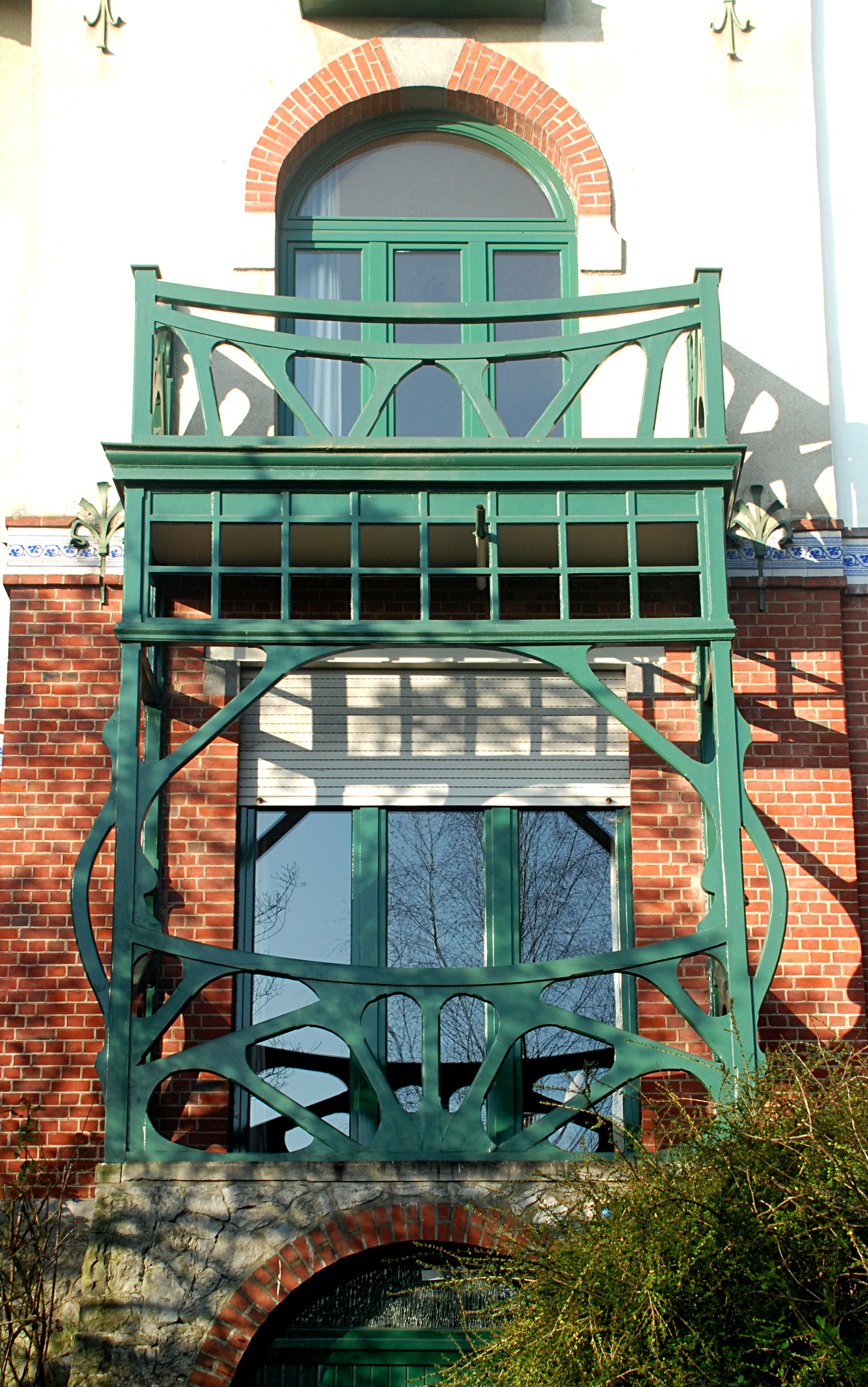 Belgique - Bruxelles - Watermael - William Jelley - Villas Art nouveau - Avenue des Taillis 9 - Balcon